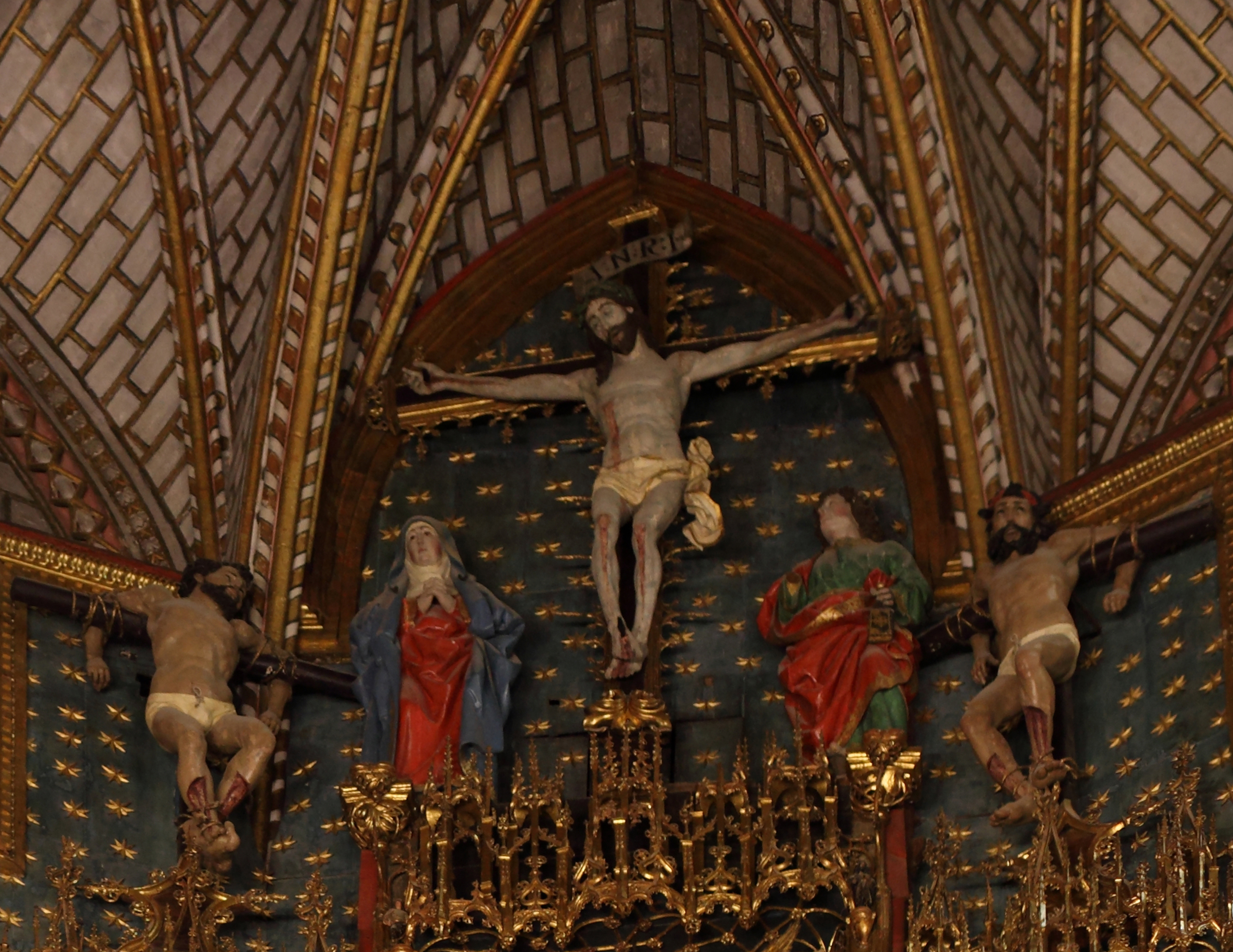 Calvario del retablo mayor de la catedral de Toledo (España)